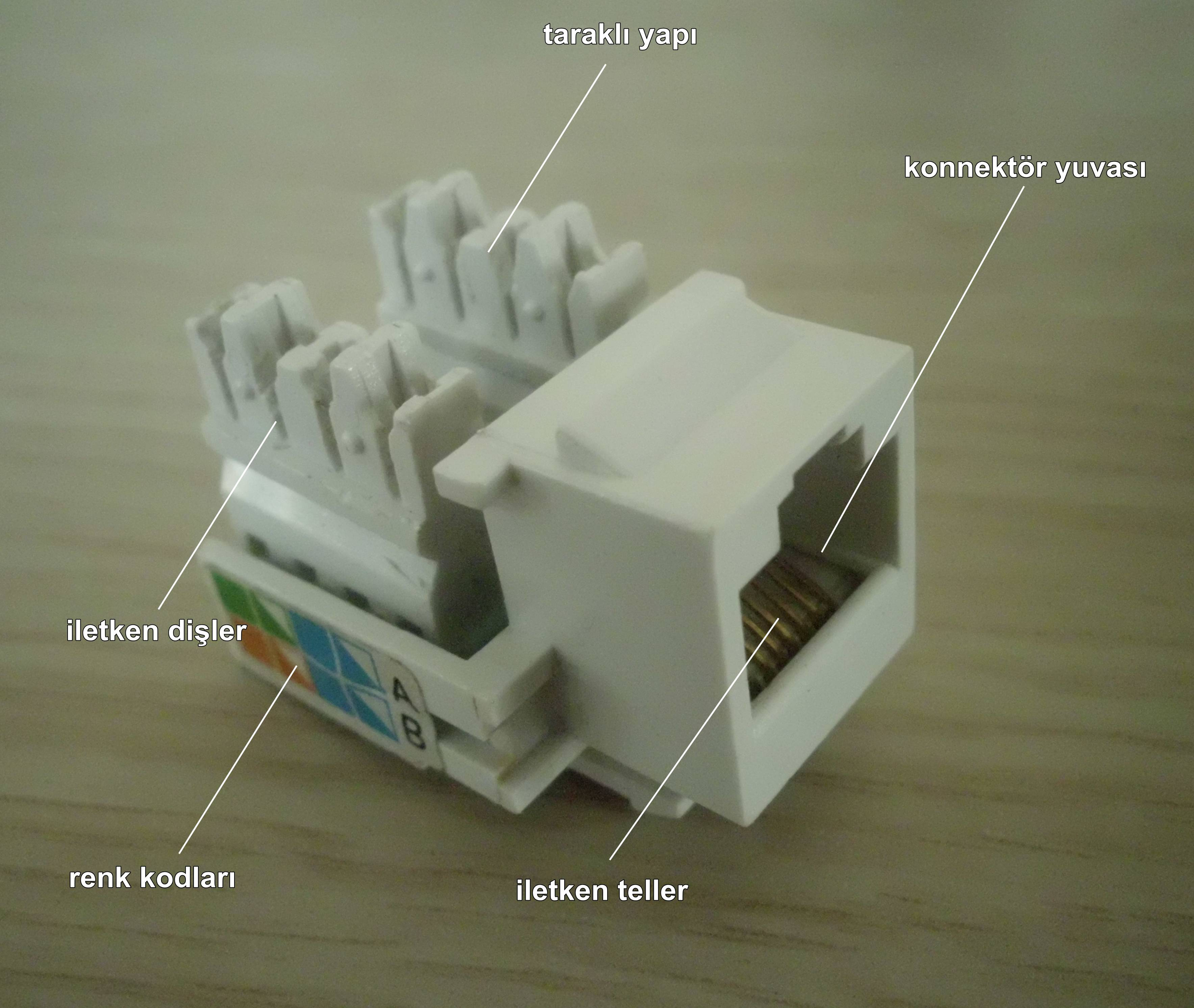 Keystone jack